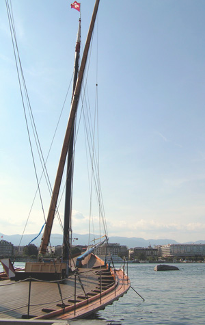 Les Pierres du Niton dans la Rade de Genève avec, en premier plan, la barque Le Neptune, Geneva - Switzerland.